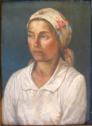 П. Южык. Сваячка